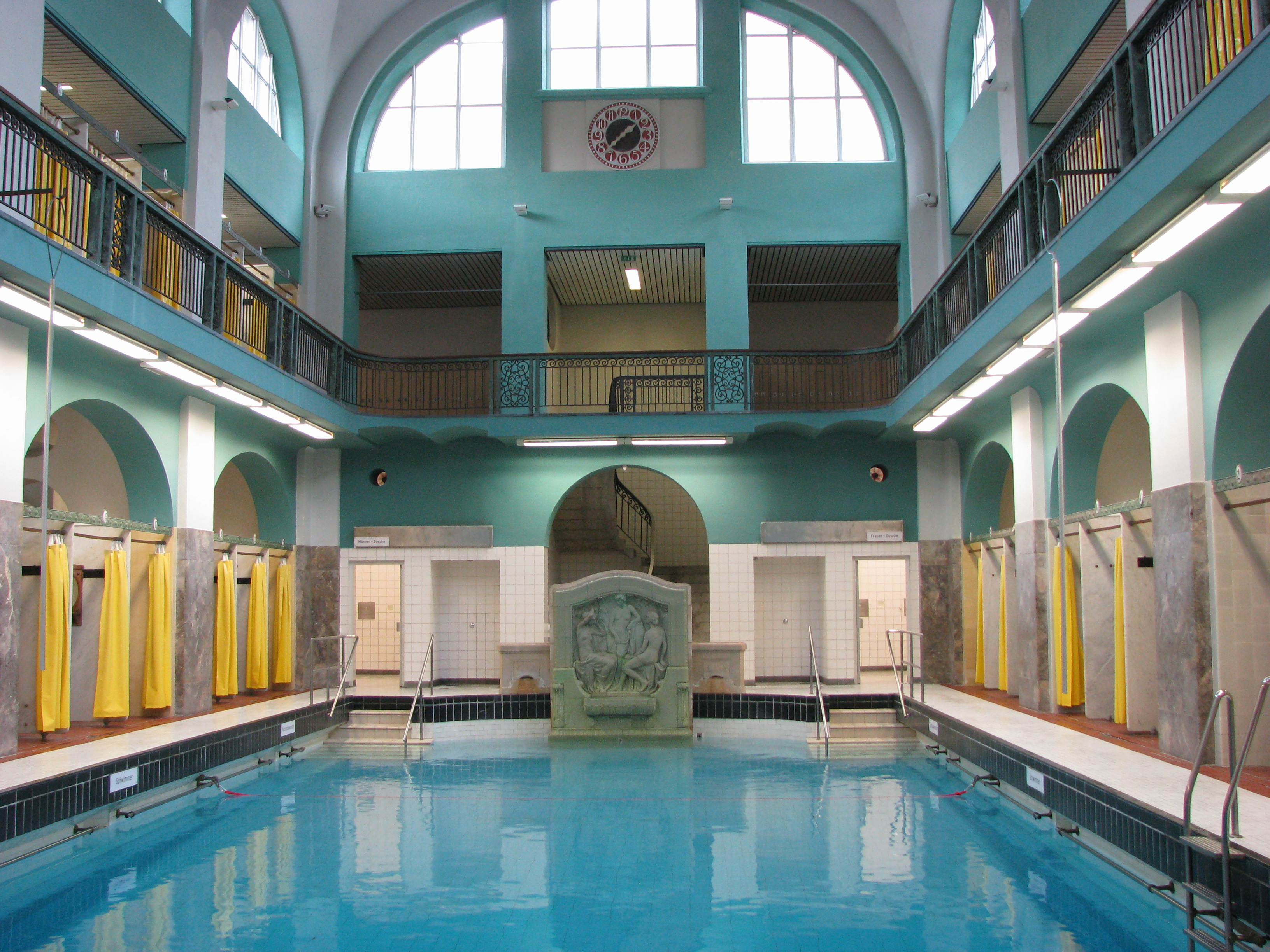 Aachen, Elisabethhalle - kleine Schwimmhalle